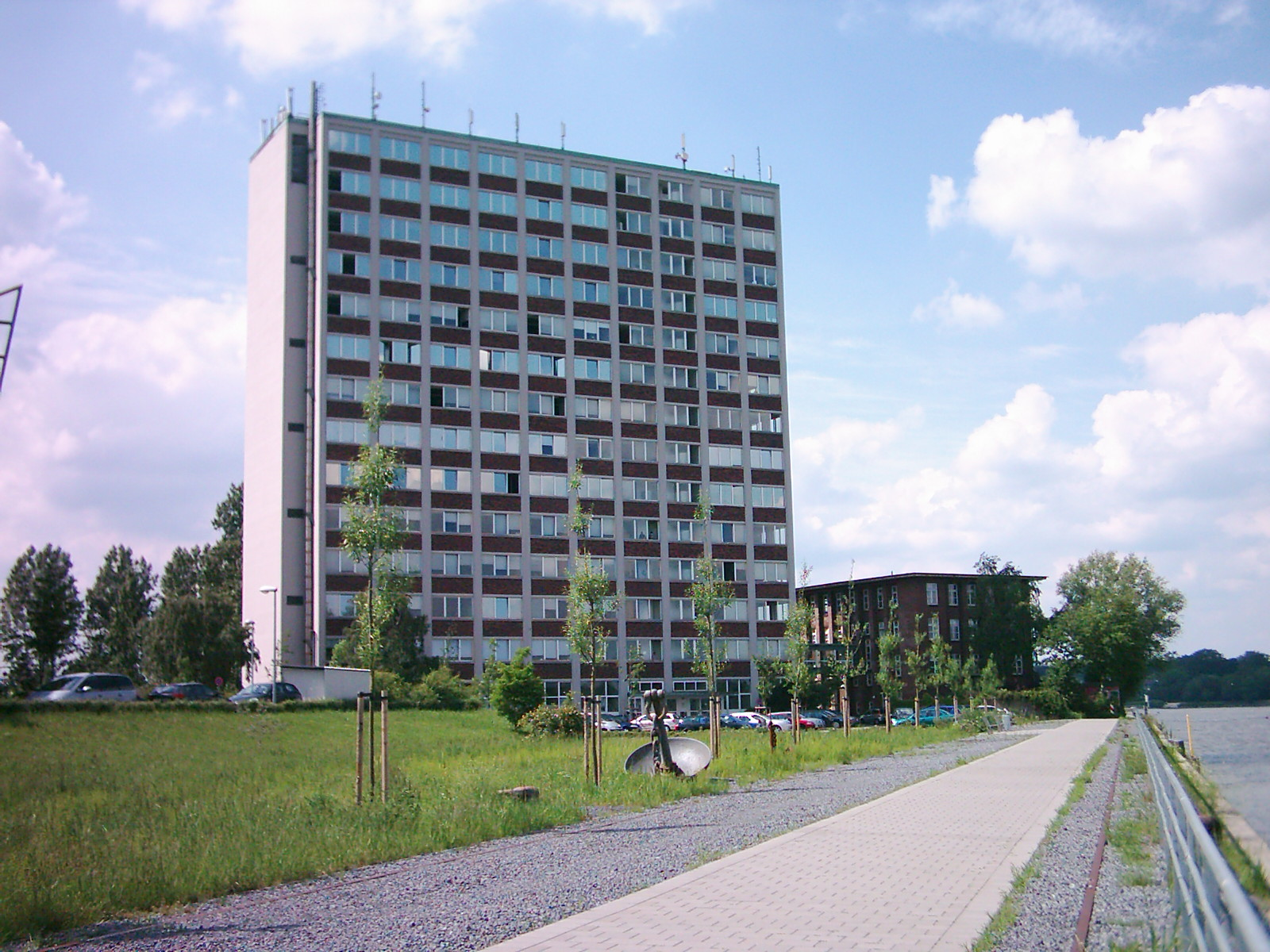 Ehemaliges Verwaltungsgebäude der Deutschen Werft, Hamburg-Finkenwerder.